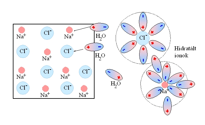 Só oldódásának, ionok hidratációjának szemléltetése